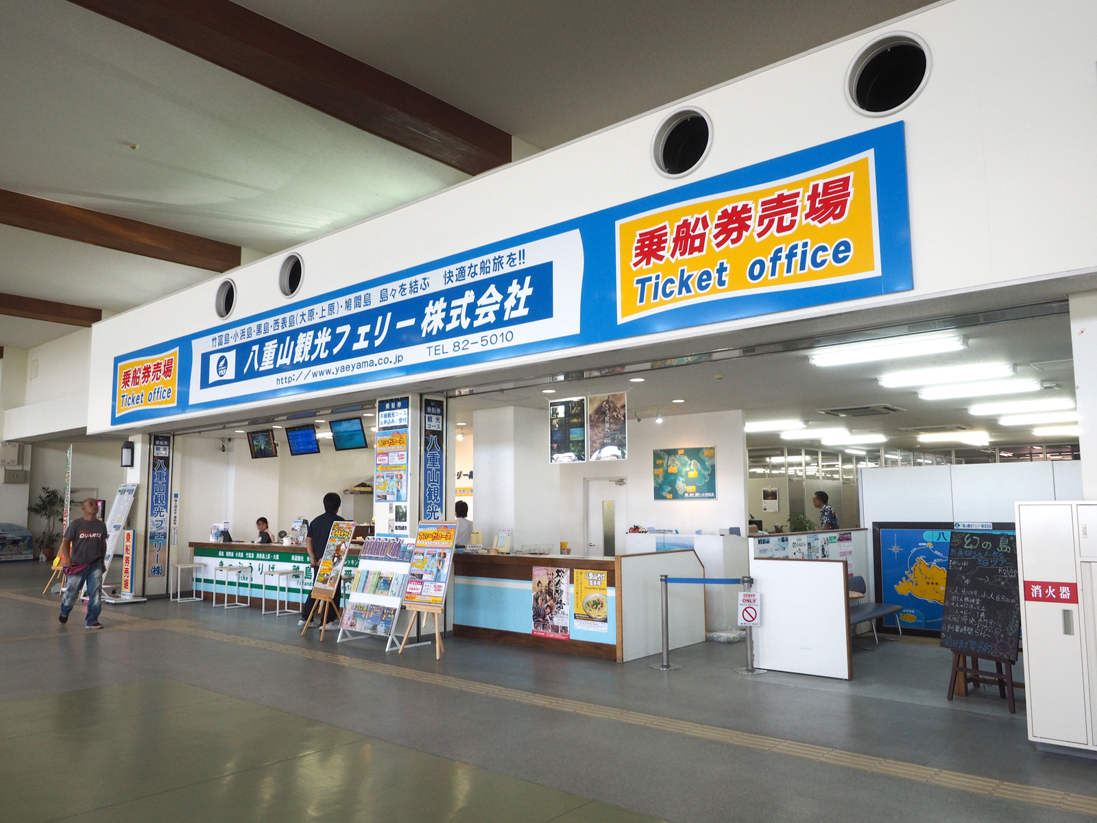 八重山観光フェリー事務所（沖縄県石垣市・石垣港離島ターミナル）